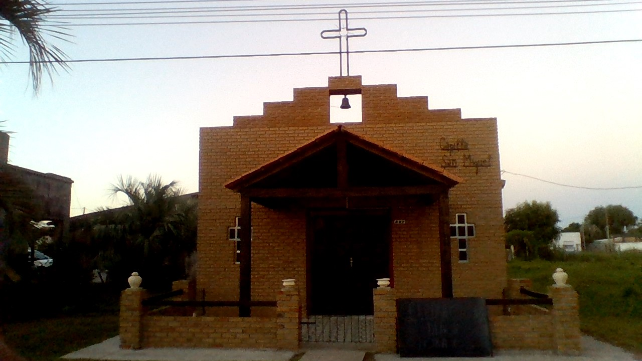 Villa 18 de Julio Departamento de Rocha Uruguay